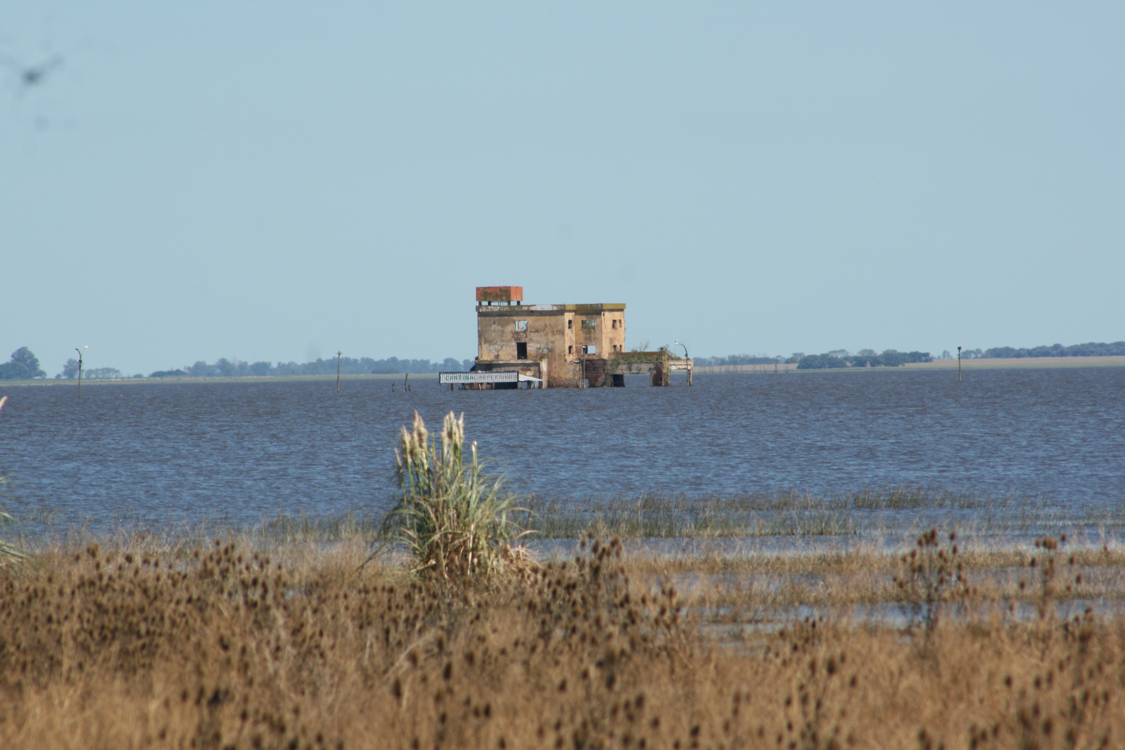 Restos del viejo Hotel Balneario Melincué